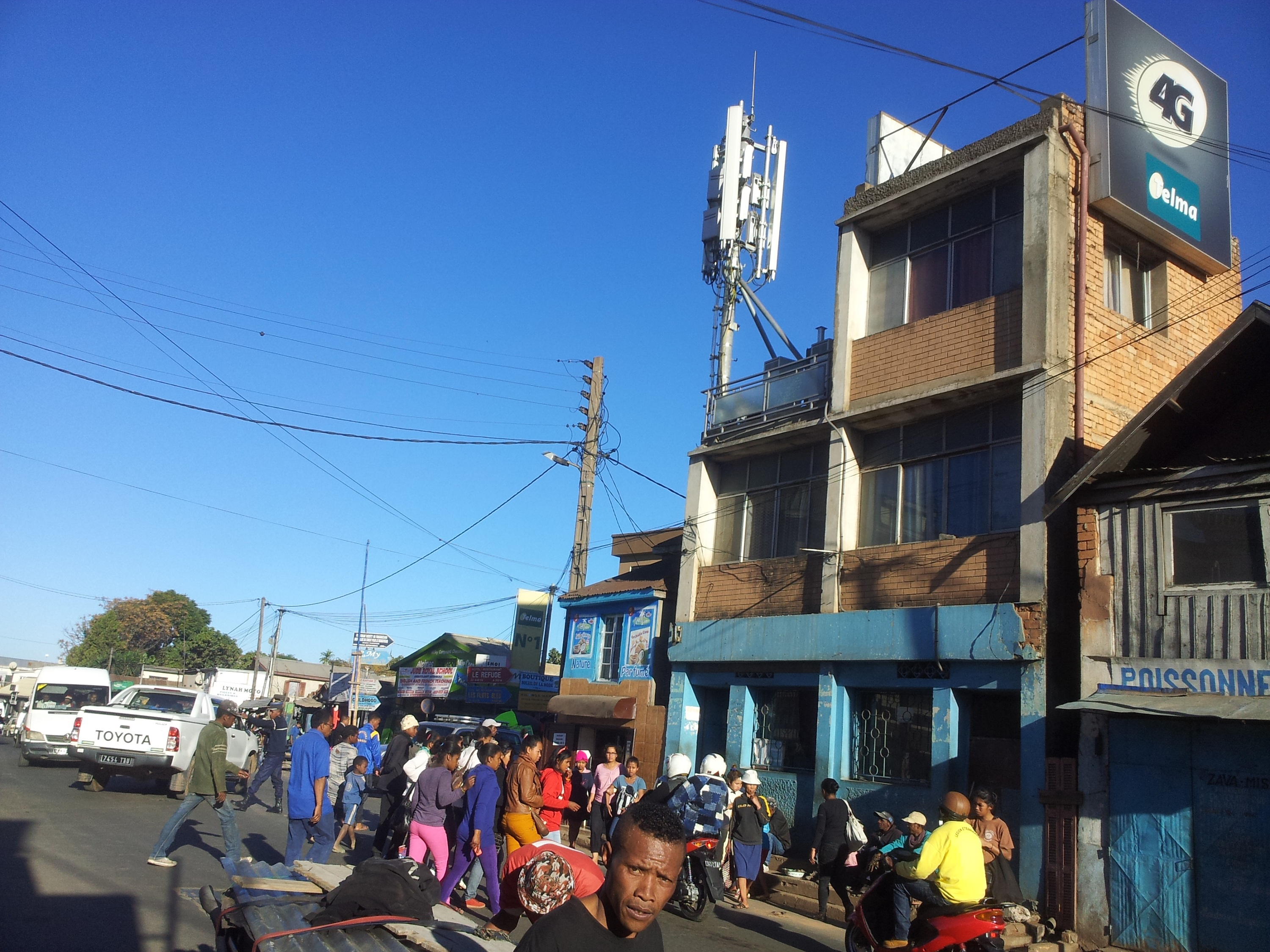 carrefour d'ambohibao antehiroka